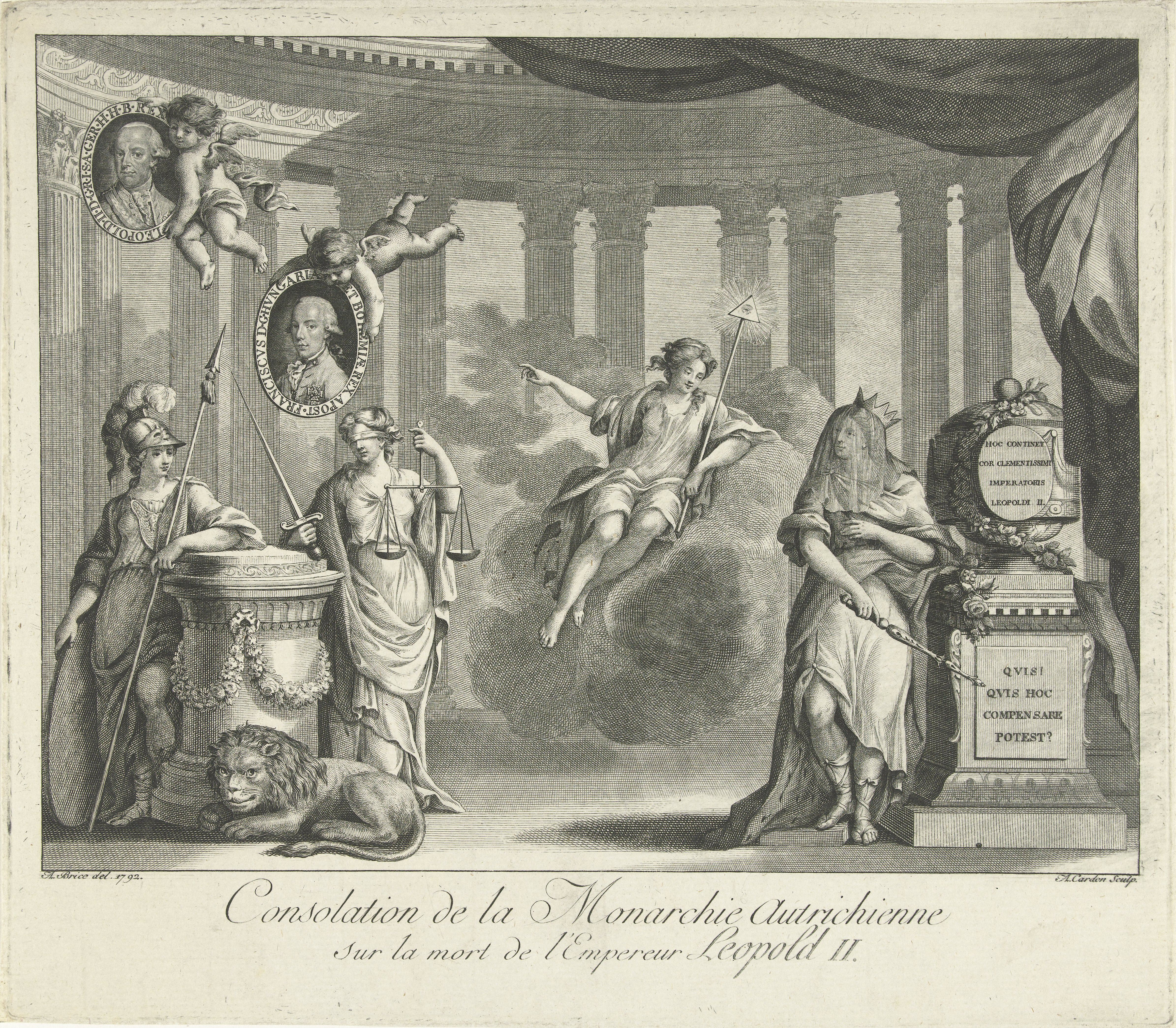 IdentificatieTitel(s): Allegorie op de troonopvolging van Leopold II Consolation de la Monarchie Autrichienne sur la mort de l'Empereur Leopold II (titel op object)Objecttype: prent Objectnummer: RP-P-1910-2038Opschriften / Merken: verzamelaarsmerk, verso, gestempeld: Lugt 2228Omschrijving: Allegorie op de troonopvolging van de Oostenrijkse keizer Leopold II door zijn zoon Frans II. Minerva en Justitia leunen op een stenen sokkel. Boven hen zweven twee putti die de portretten van Leopold II en Frans II dragen. Rechts het grafmonument van Leopold II met de rouwende keizerin.VervaardigingVervaardiger: prentmaker: Antoine Cardon (mogelijk)prentmaker: Antoine Alexandre Joseph Cardon (mogelijk)naar tekening van: Antoine Brice (vermeld op object)Plaats vervaardiging: Brussel (mogelijk)Datering: 1792Fysieke kenmerken: etsMateriaal: papier Techniek: etsenAfmetingen: plaatrand: h 235 mm × b 268 mmOnderwerpWat: (story of) Minerva (Pallas, Athena)Justice; 'Forza alla giustitia sottoposta', 'Giustitia', 'Giustitia retta', 'Giustitia rigorosa', 'ImpietÃ e violenza soggetta alla giustitia' (Ripa)Wie: Leopold II (keizer van Oostenrijk)Frans II (Rooms-Duits keizer)Verwerving en rechtenVerwerving: aankoop 1910Copyright: Publiek domein